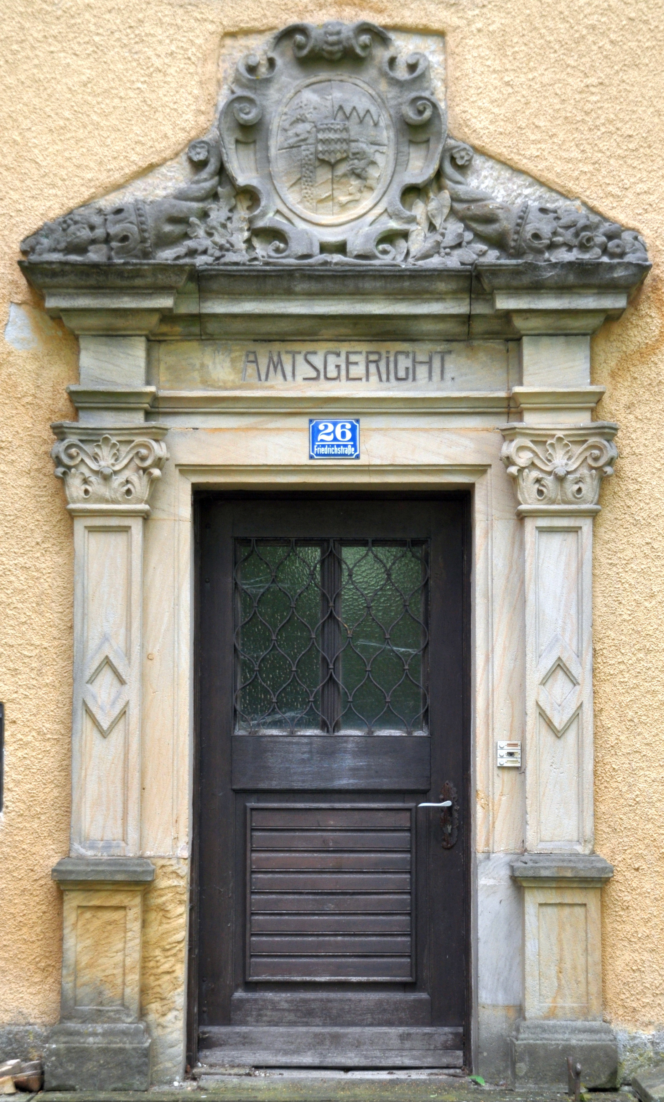 Altes Amtsgericht (bei der Friedrichsburg) in Vohenstrauß (Deutschland)